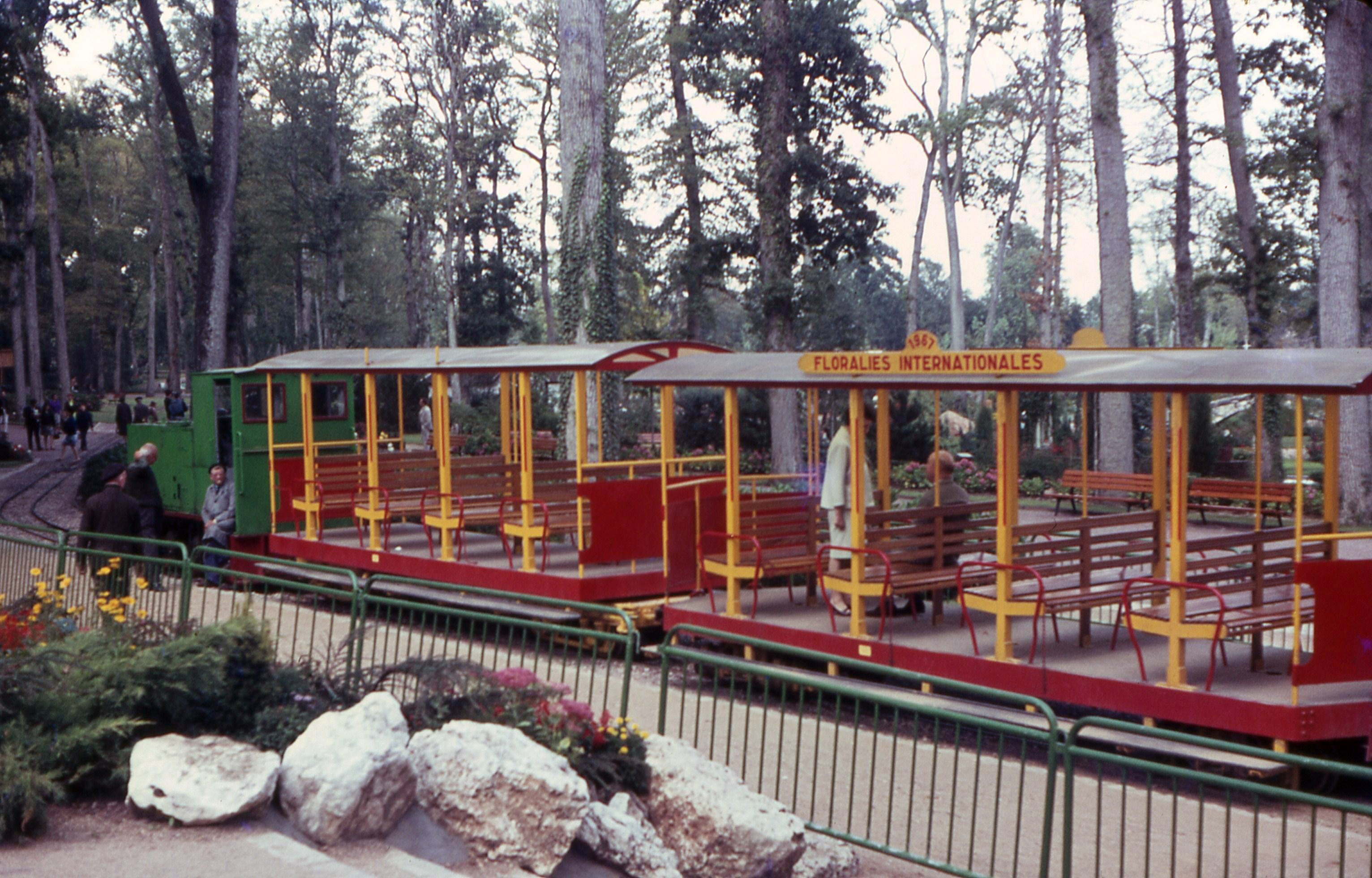 Floralies internationales 1967, Parc Floral de la Source, Orléans, Loiret, France. C est un Gmeinder HF 130C ex Roberval maintenant ferraillé. La premiere baladeuse ex tombereau Decauville sur wagon type 1915 du TPT et l autre ex tombereau Pershing TPT. Les caisses sont de construction Cadoux.